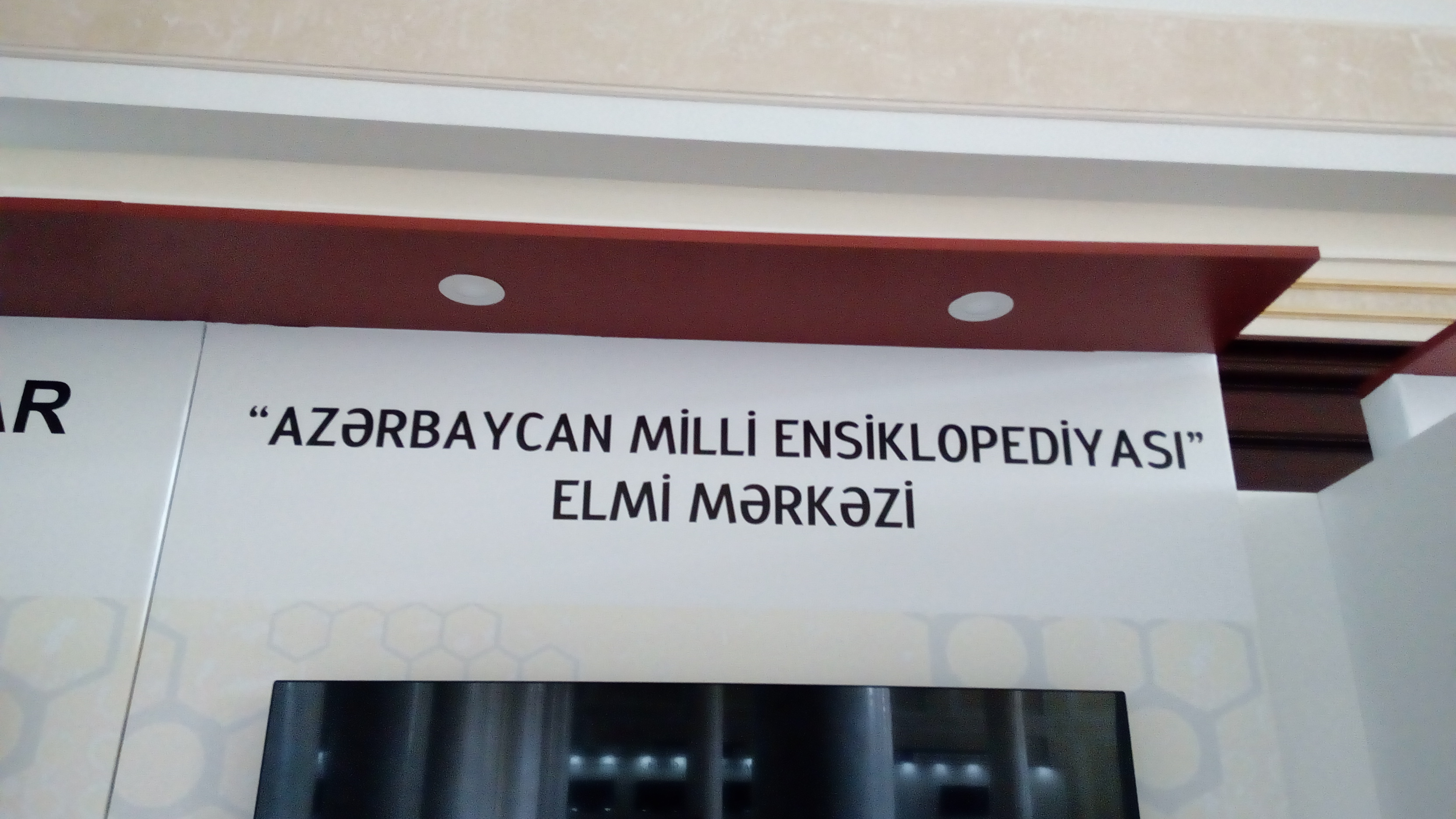 AMEA-nın sərgisi